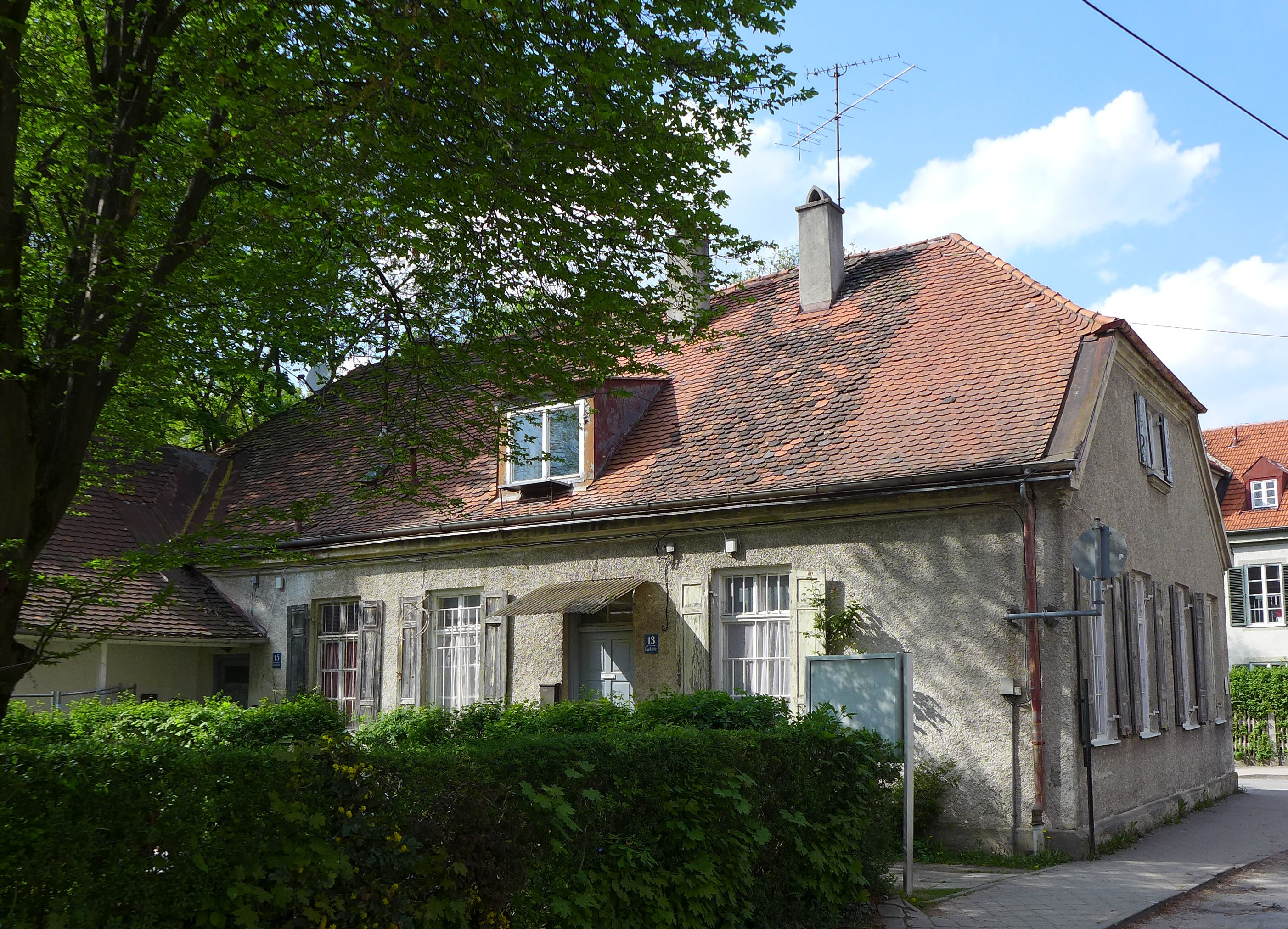 Engelbertstr. 13, München